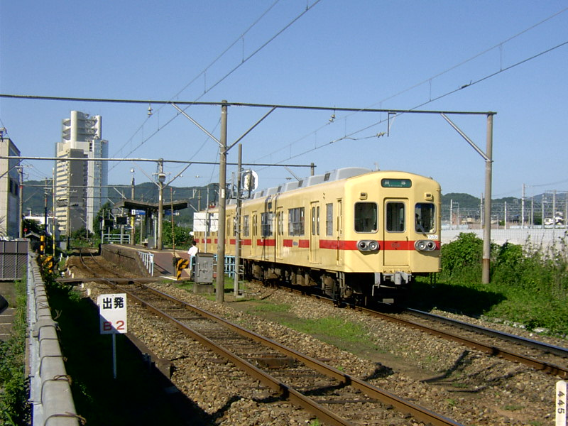 地上駅時代の名島駅。